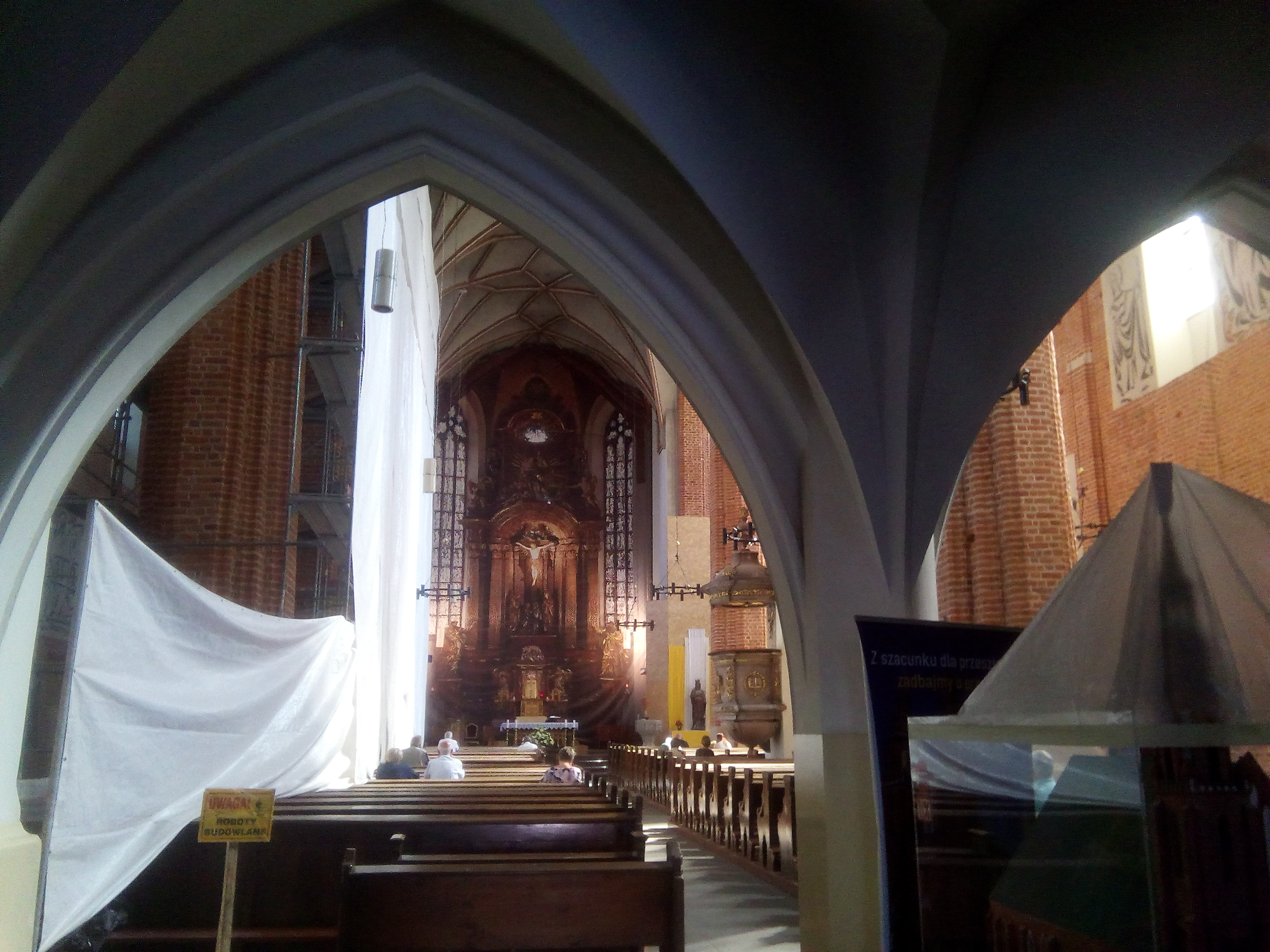 Katedrála Svatého Kříže v Opole